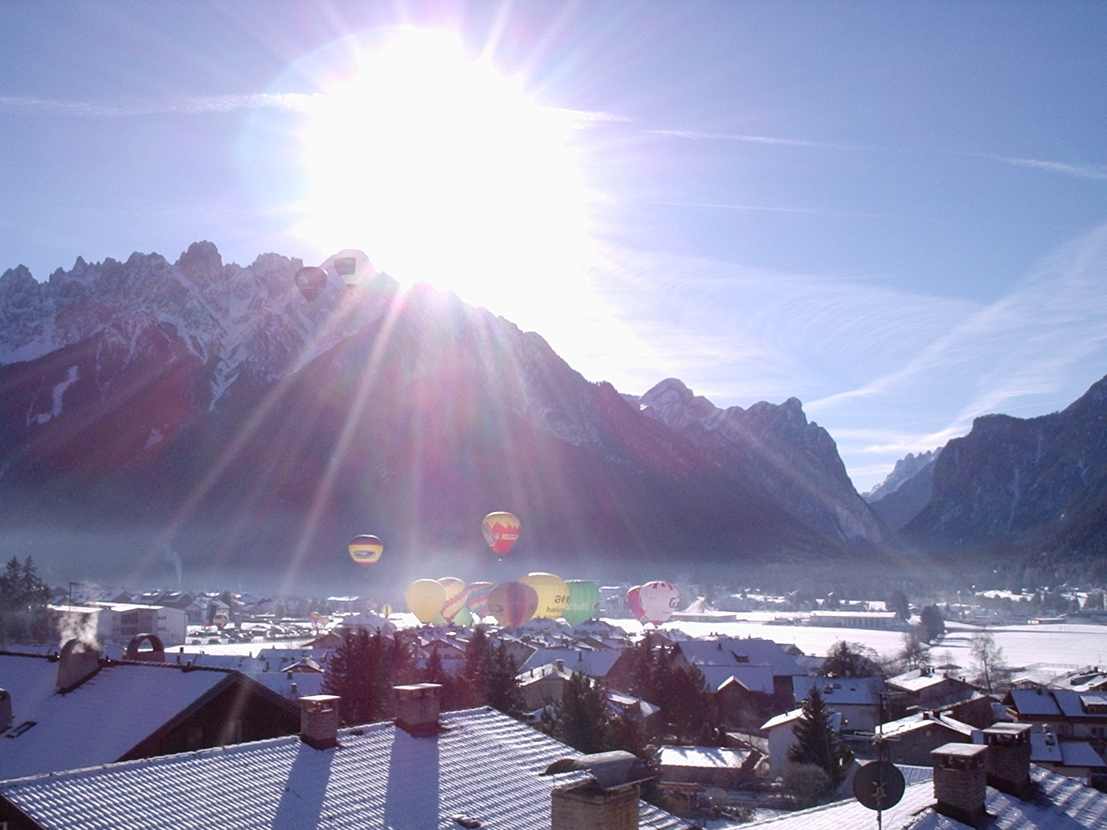 Festival delle mongolfiere a Dobbiaco